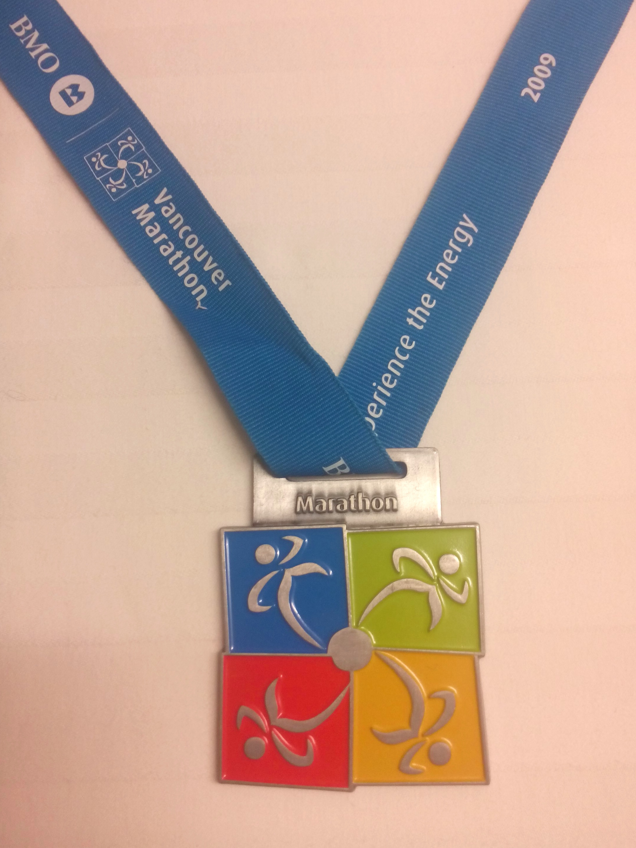 Finisher-Medaille des Vancouver-Marathon 2009.